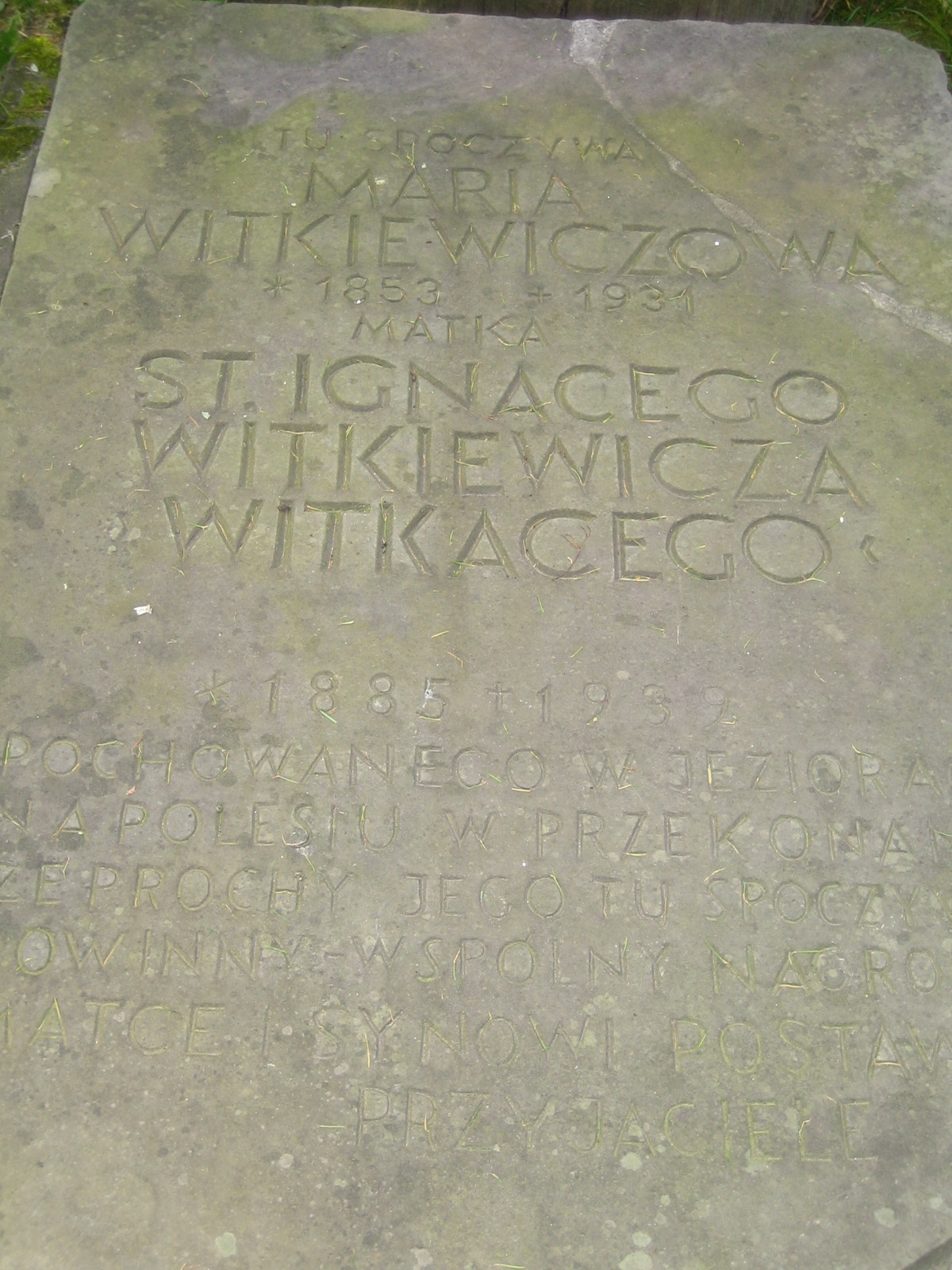 Płyta na grobie Marii Witkiewiczowej